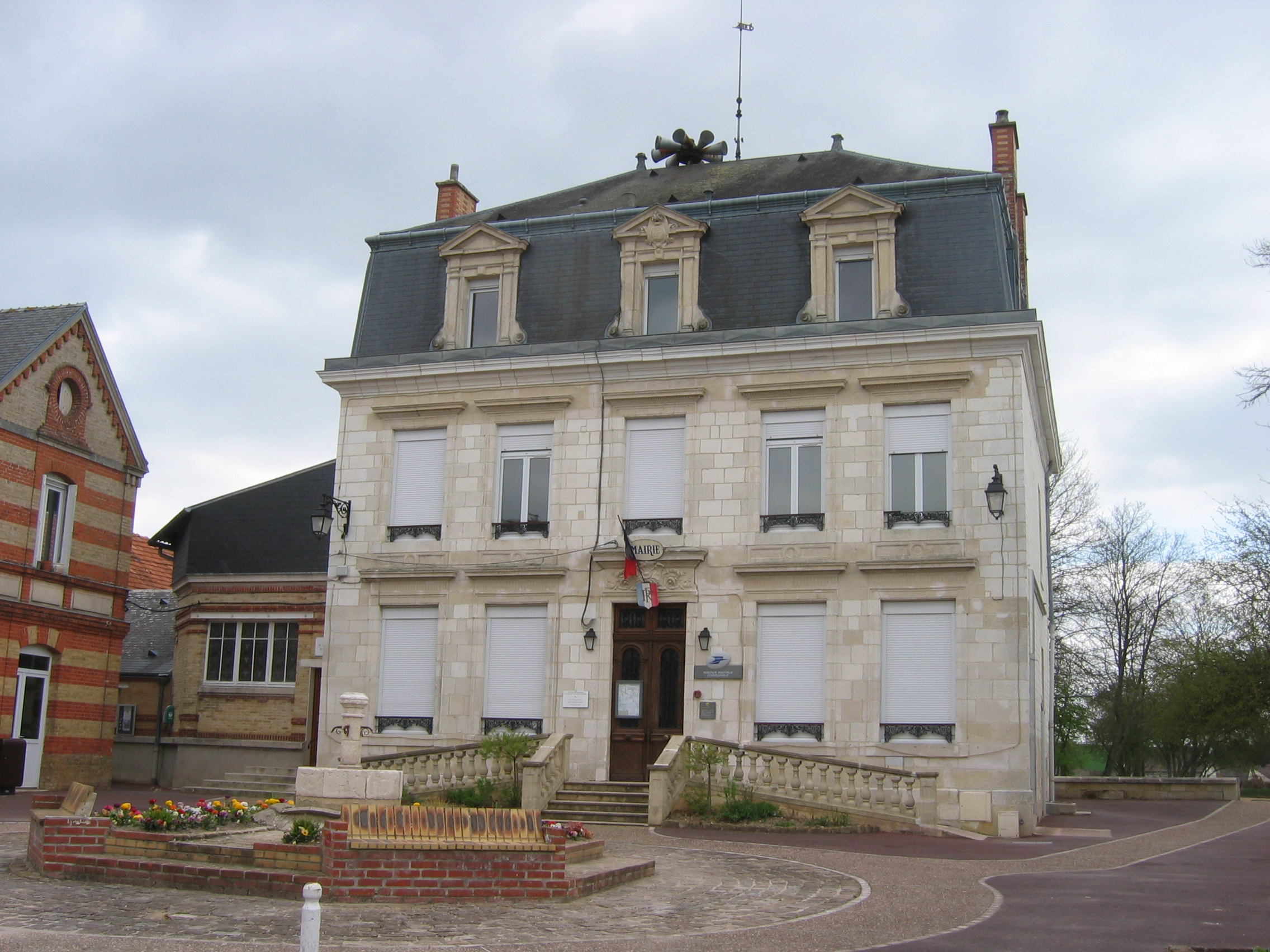 Mairie de St-Germainmont Ardennes France